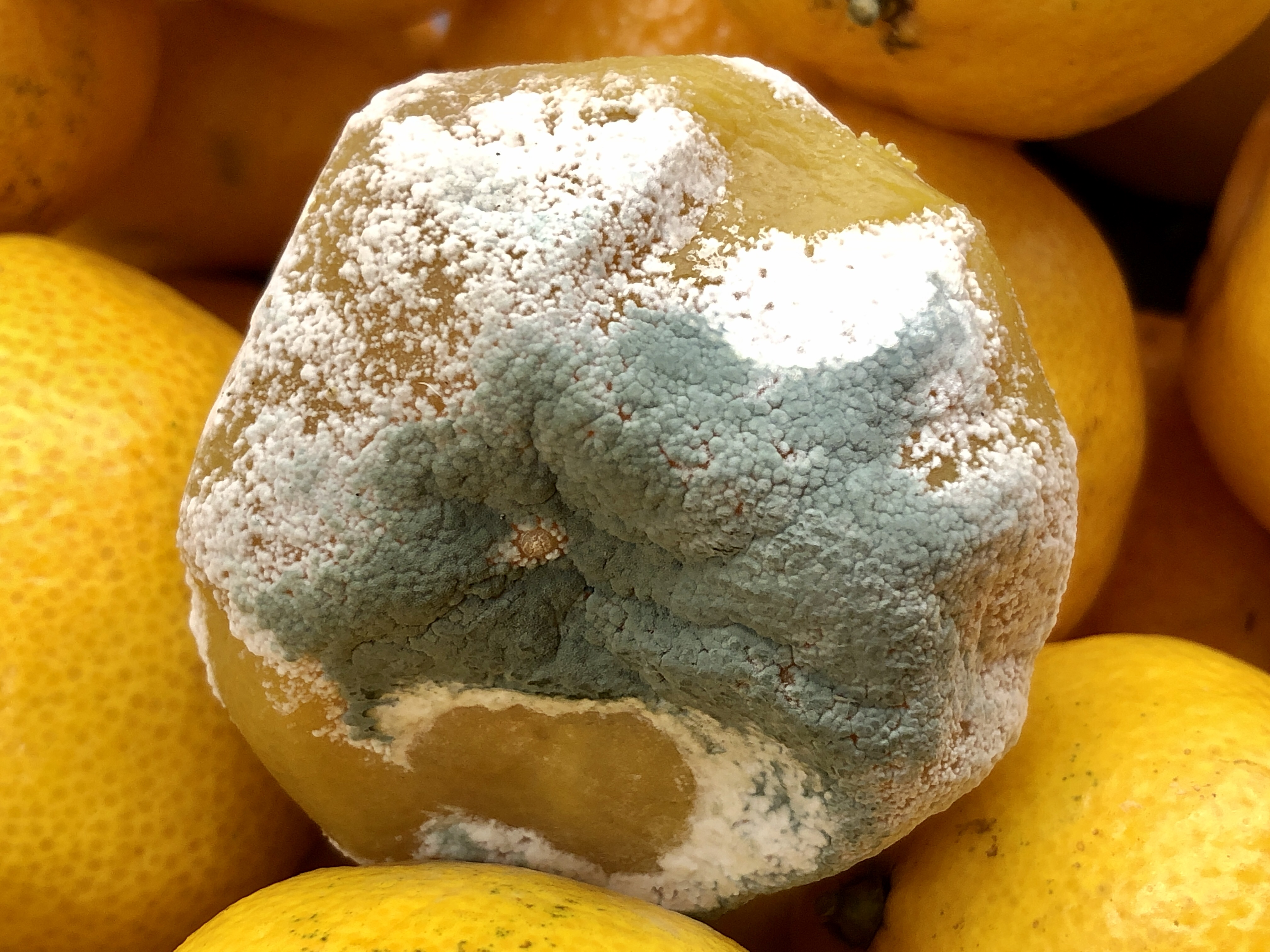 Пеницилл (Penicillium sp.) на мандарине